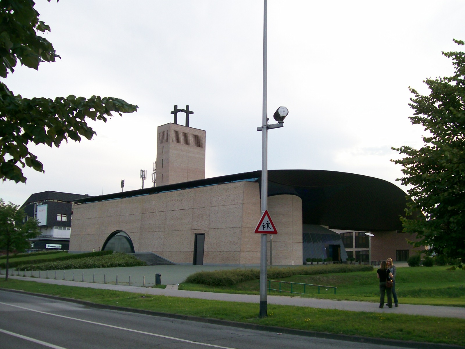 Crkva Sveta mati slobode na Jarunu, Zagreb